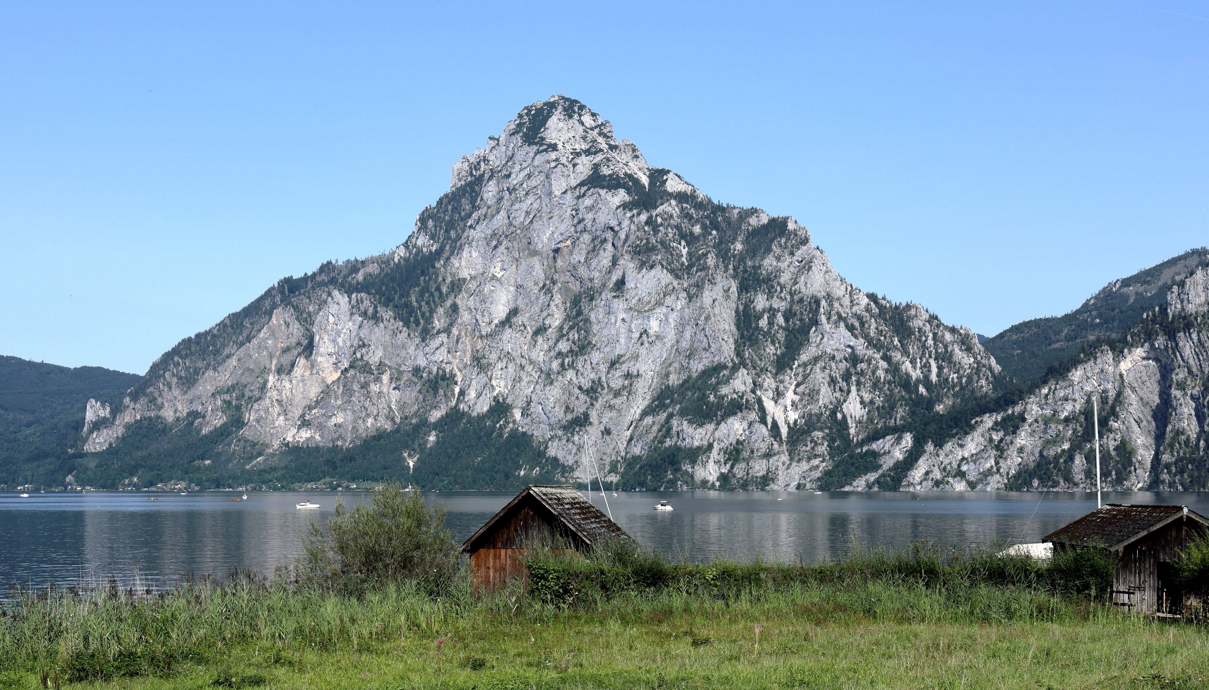 Westsüdwestansicht des Traunsteins vom Westufer des Traunsees.Von dieser Perspektive ist nur der 1575 m hohe Traunkirchner Kogel mit dem Traunsteinhaus (Naturfreundehütte) sichtbar. Die anderen zwei Kogel auf dem Gipfelplateau, der 1666 m hohe Fahnenkogel mit der Gmundnerhütte und der 1691 m hohe Pyramidenkogel im Nordosten mit dem Gipfelkreuz, sind nicht sichtbar.